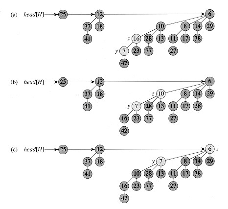 조선말: 과제를 위한 일시적인 이미지 사용